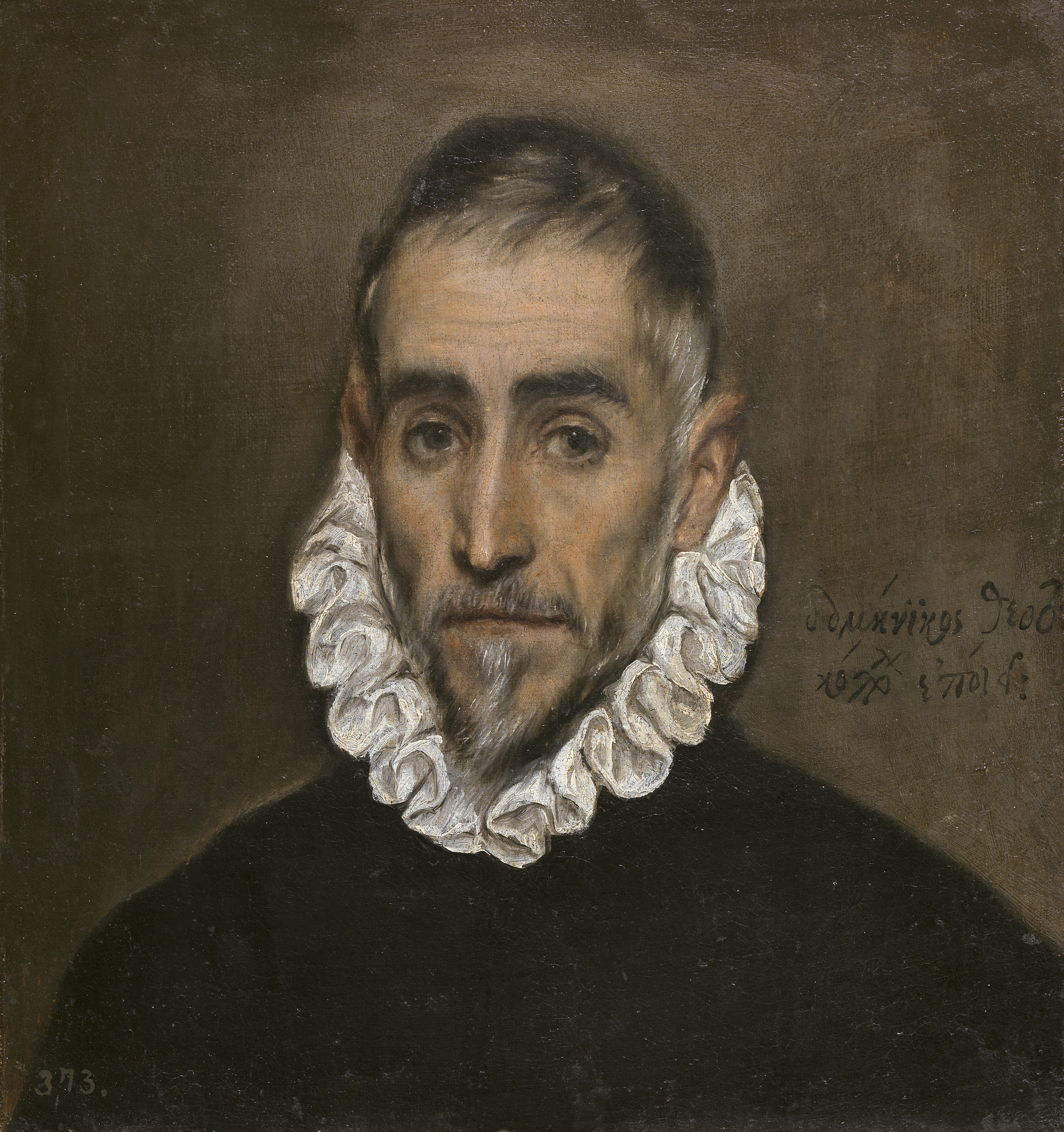 La obra, titulada Retrato de caballero anciano, debió ser pintada por El Greco aproximadamente entre 1587 y 1600.